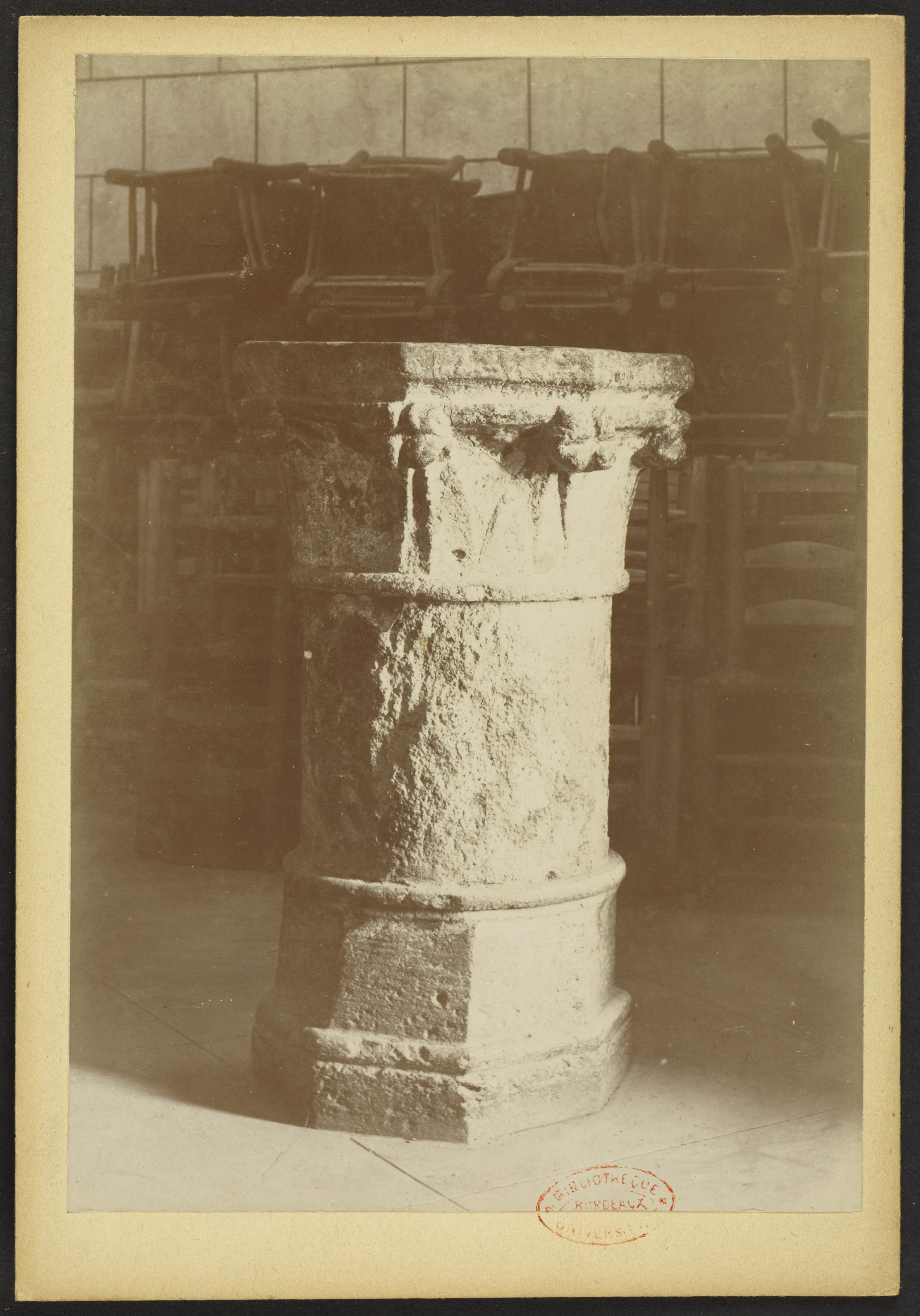 Église Saint-Sauveur-et-Saint-Martin de Saint-Macaire; bénitier (XIIe siècle)